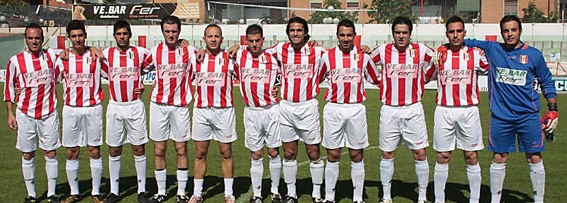 Santo Stefano Rende 2007-2008 (S.S. Rende vs Castellese)